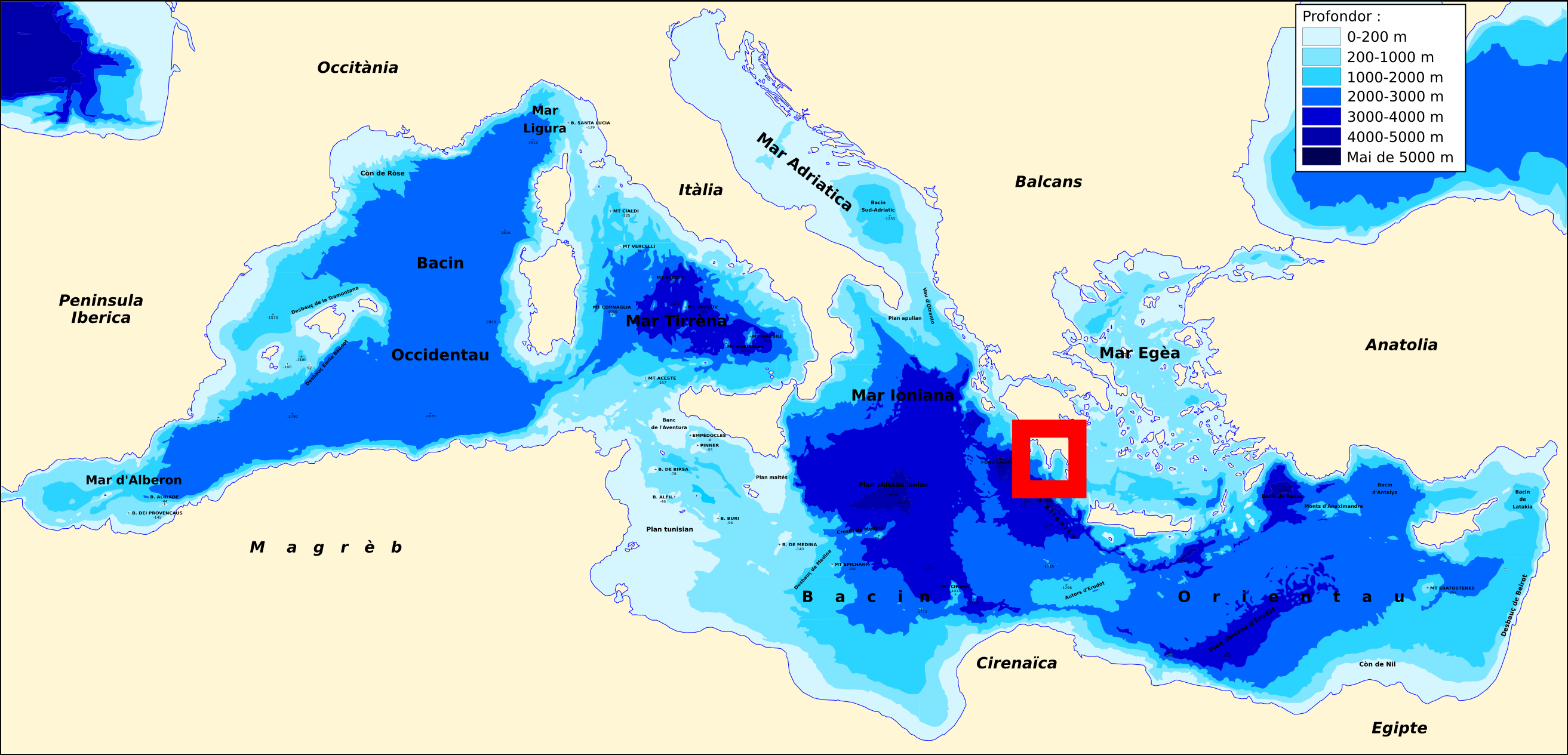 Localizacion dau Cap Matapan